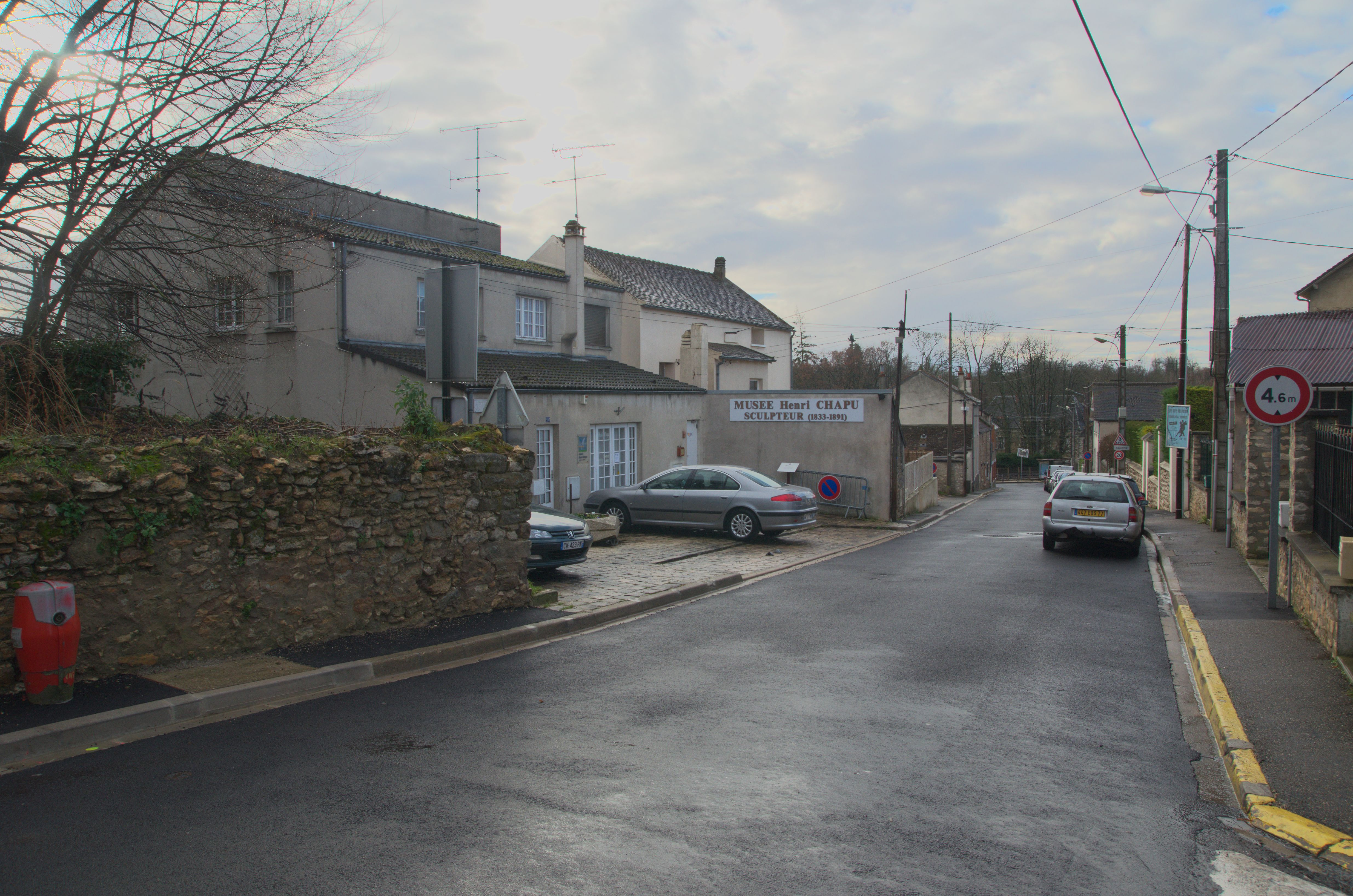 Bas de la rue Chapu au Mée-sur-Seine et le Musée Henri-Chapu.